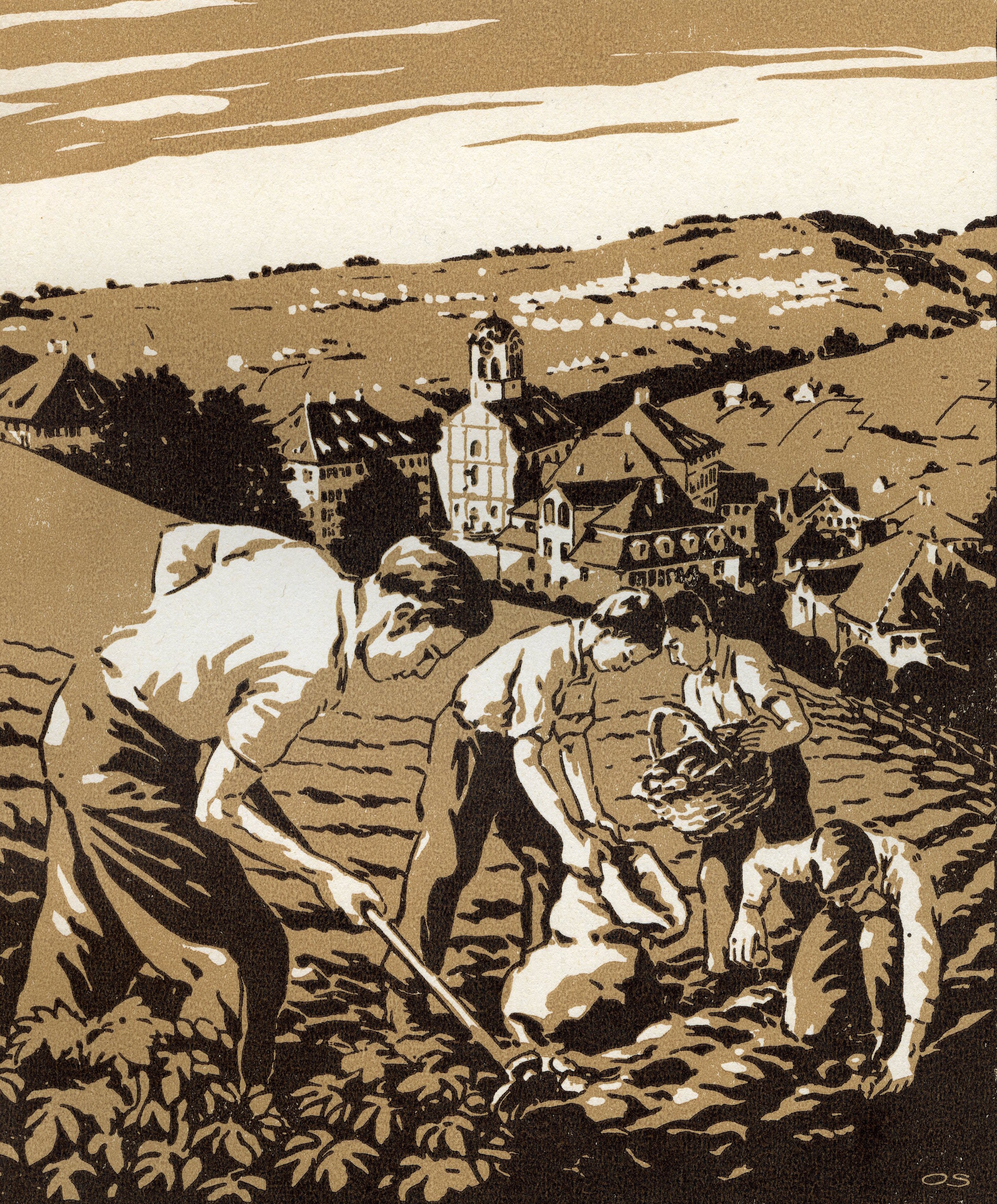 Cover der KVT-Mitteilungen Nr. 20 (Ausschnitt). Anbauschlacht im 2. Weltkrieg. «Schülerwiese», südlich des Landsgemeindeplatzes Trogen. Linolschnitt